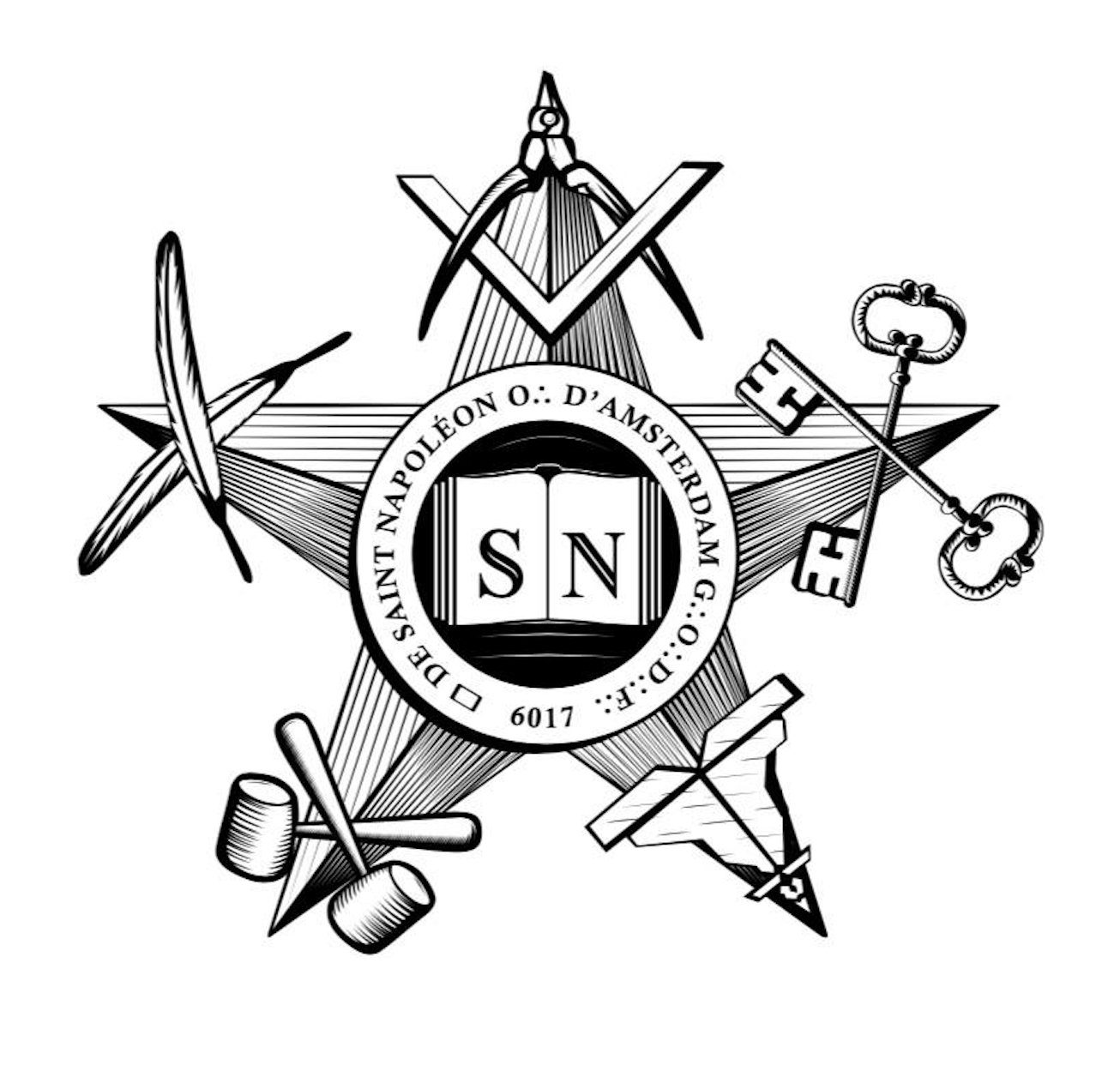 nieuw zegel LSN